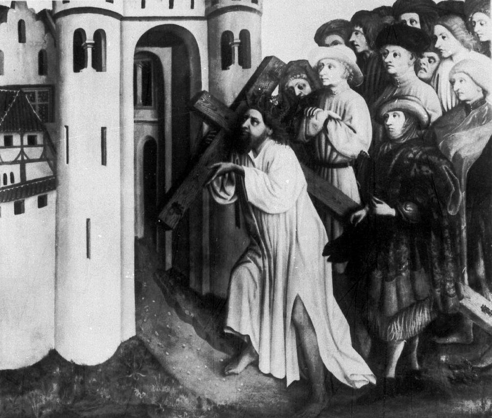 Werksattt Hans Multscher: Flügel eines Altars (zersägt), um 1440, Innenseite, untere Tafel: Kreuztragung des Kaisers Heraklius; Tannenholz, 83 x 98 cm; Sammlung: Sammlungen der Fürsten von Waldburg-Wolfegg, Wolfegg (Foto: 1900–1940); Leihgabe im Ulmer Museum